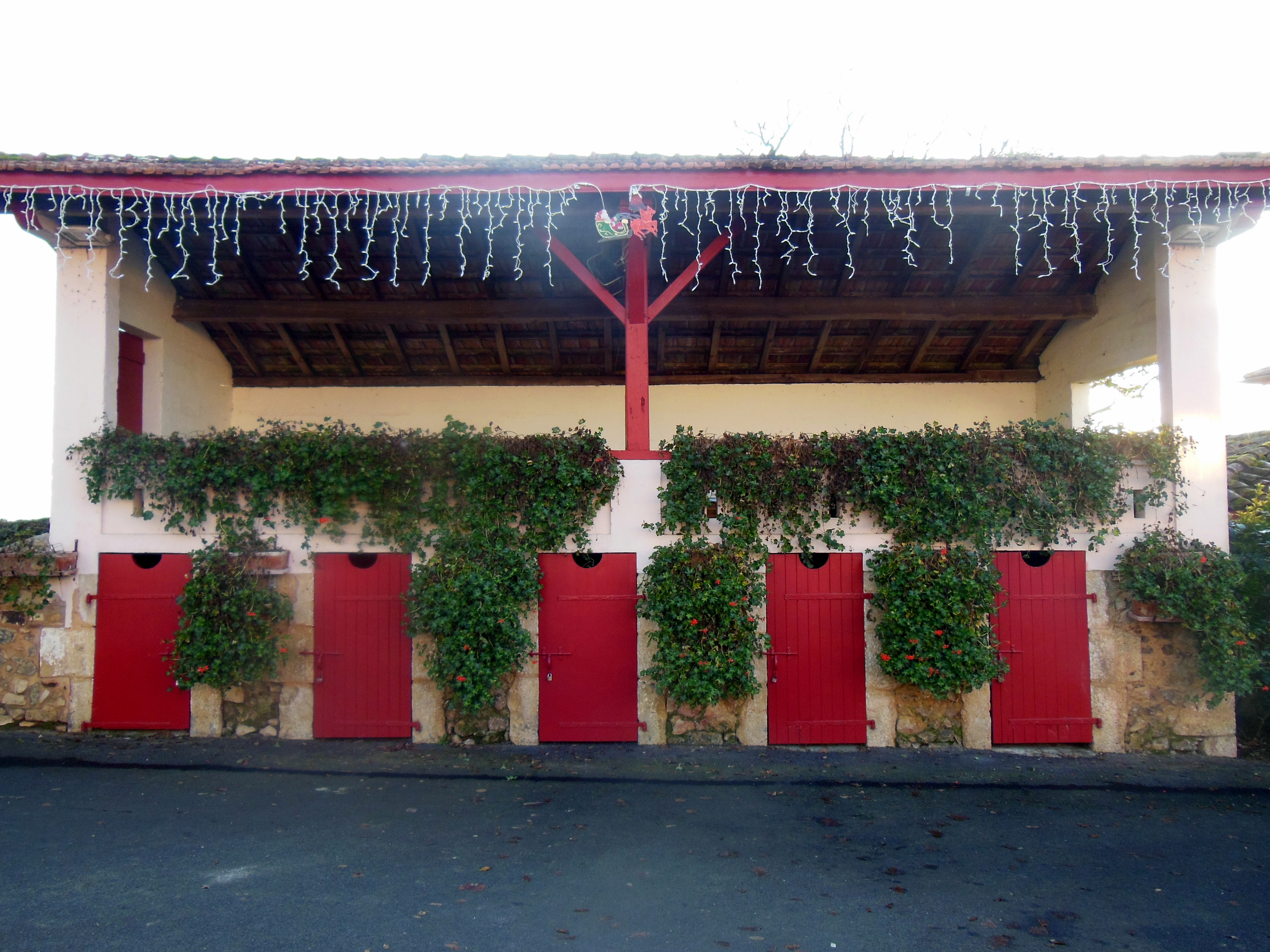 Arènes de Larbey (Landes, France)